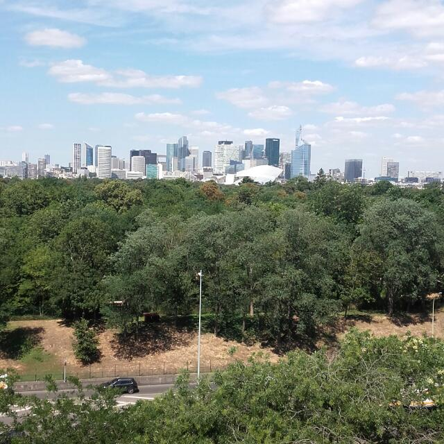 La Défense - Vue à partir de la bibliothèque de Dauphine